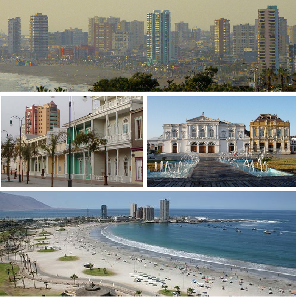 fotos de Iquique